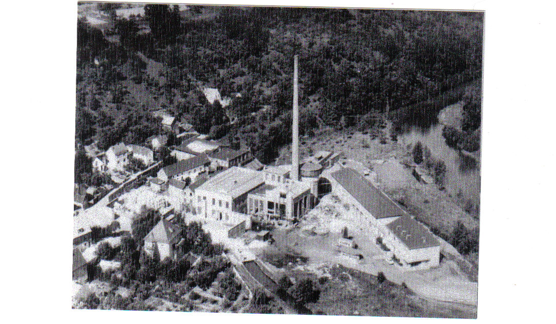 Die Windener Papierfabrik vom Flugzeug aus gen norden aufgenommen im August 1968.